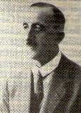 Opitz Ferdinand, akademický sochař